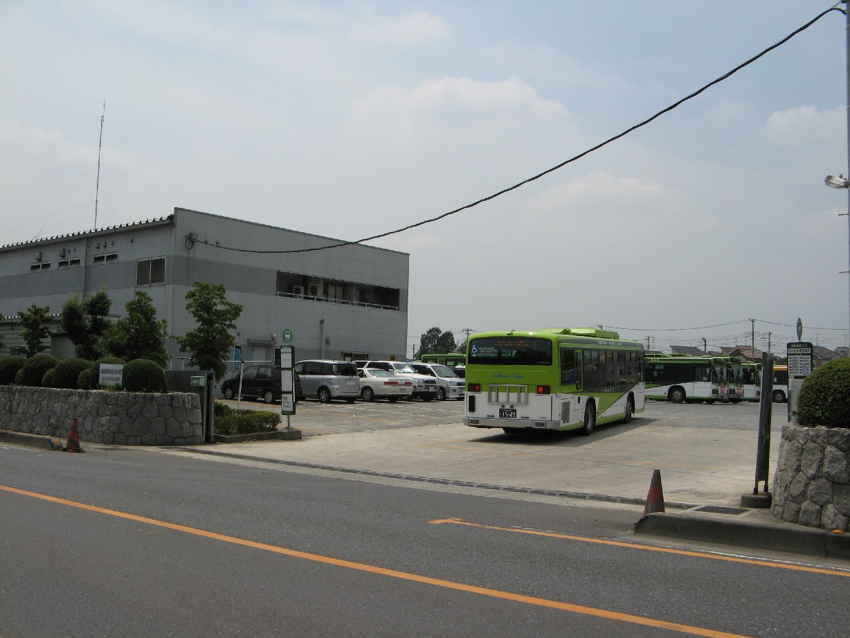 国際興業バスさいたま東営業所社屋の一部と車両、停留所。敷地外より撮影。